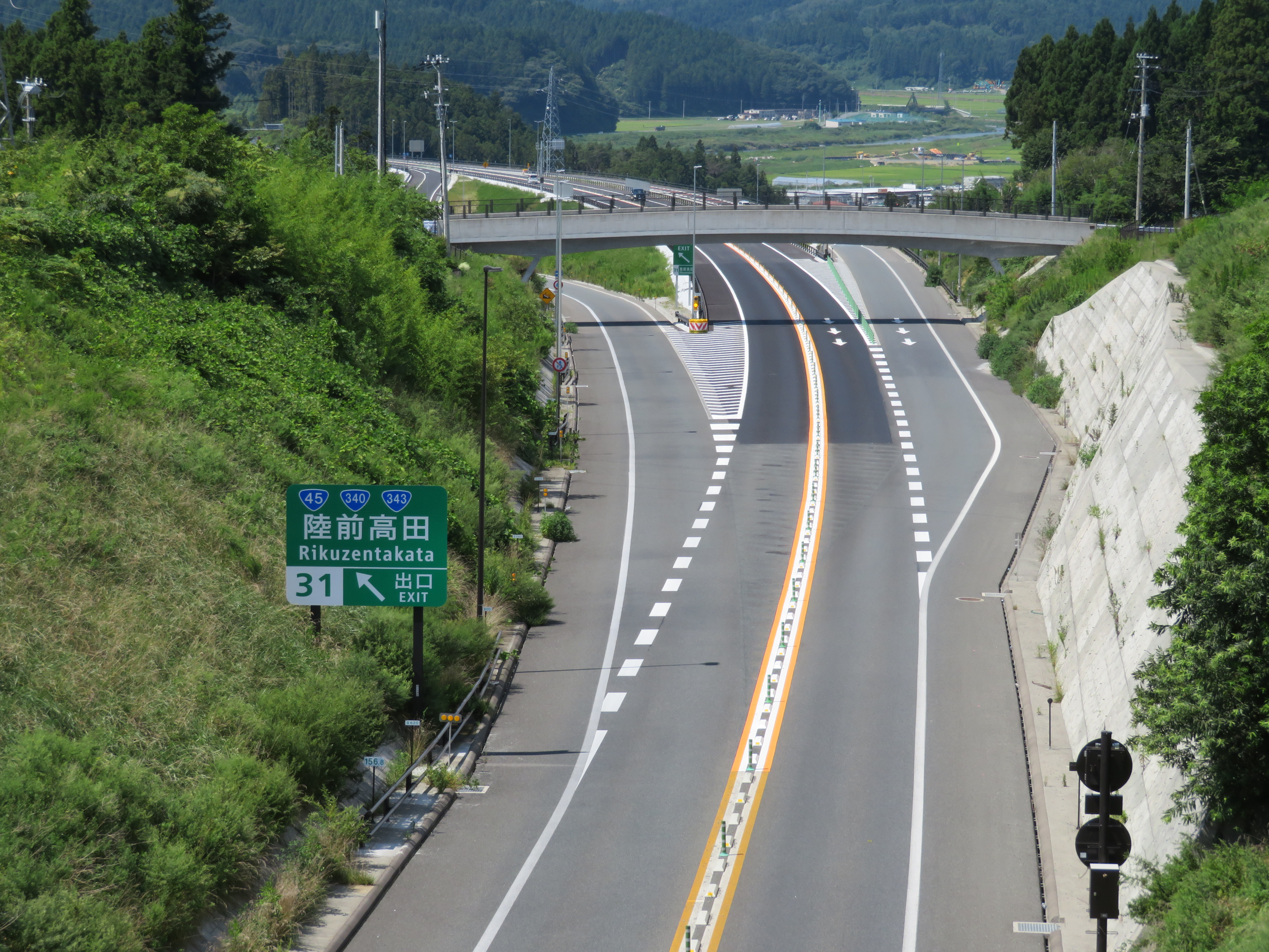 三陸自動車道陸前高田インターチェンジ釜石方面側出入口付近 !Canon PowerShot SX720 HS